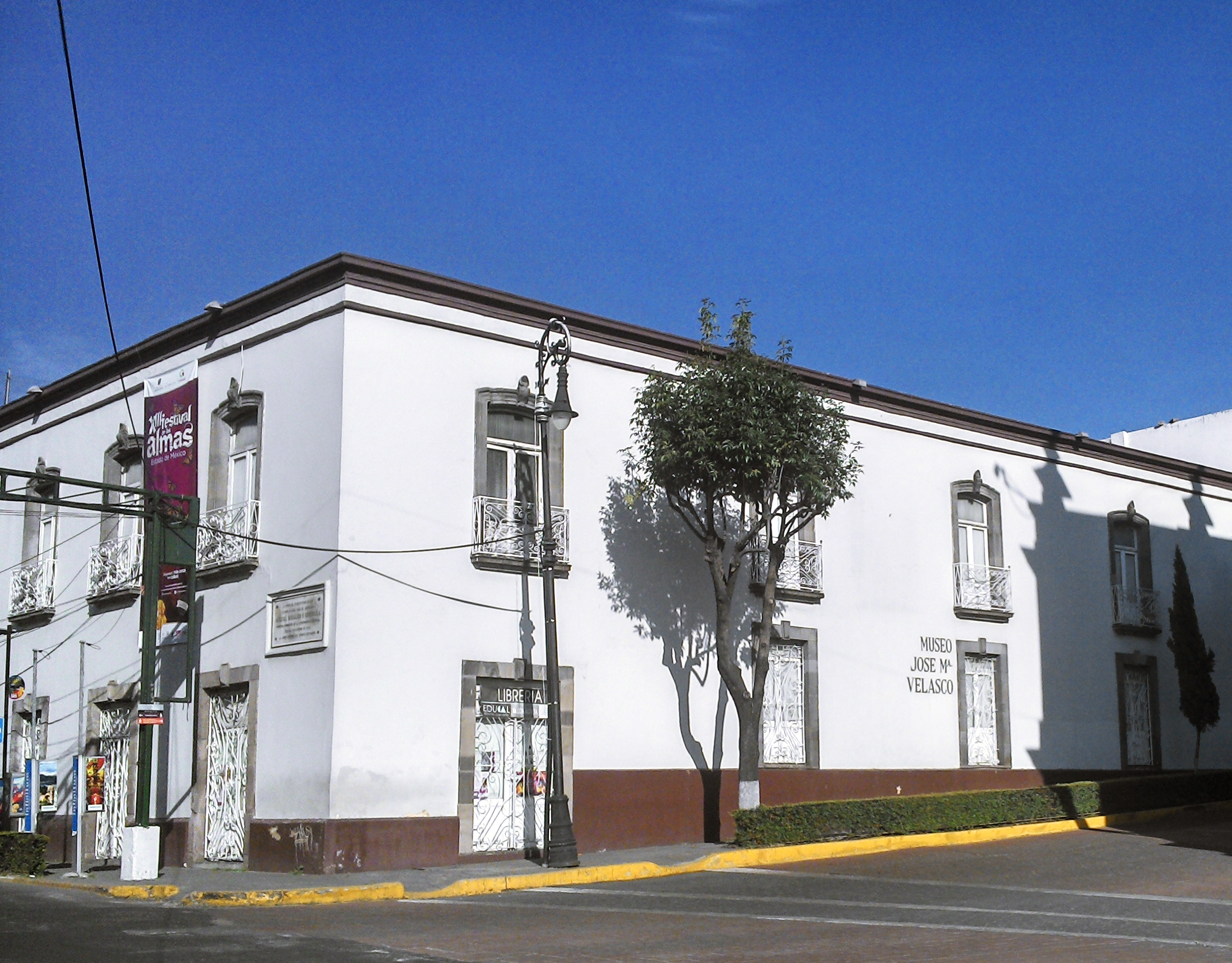 Museo José María Velasco